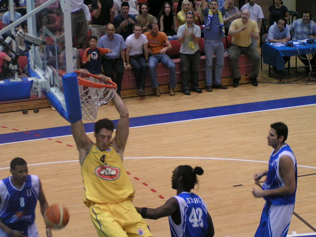 יניב גרין